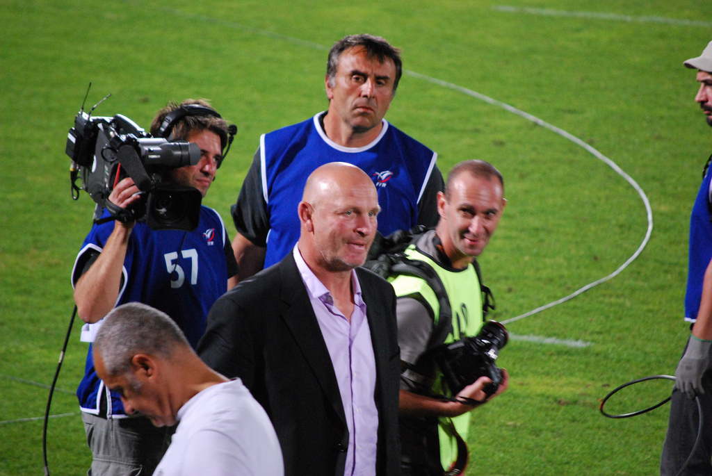 L'entraîneur Neo Zelandais Vern Cotter à la fin de la demi-finale de top 14 2008-2009 ASM Clermont / Stade toulousain.